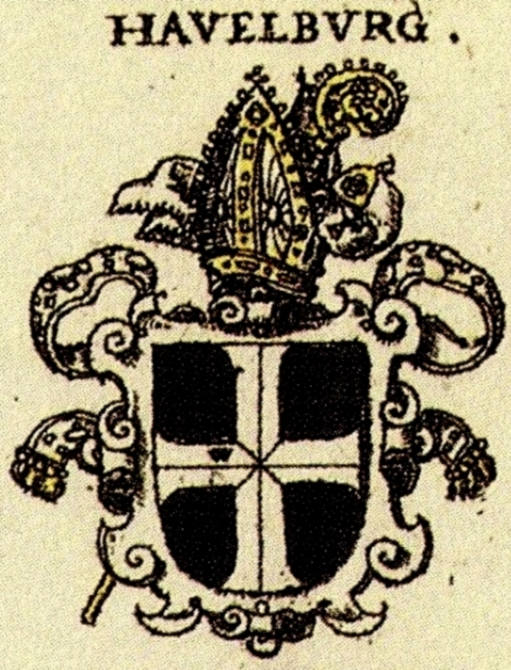 Wappen des Bistums Havelberg nach Siebmachers Wappenbuch